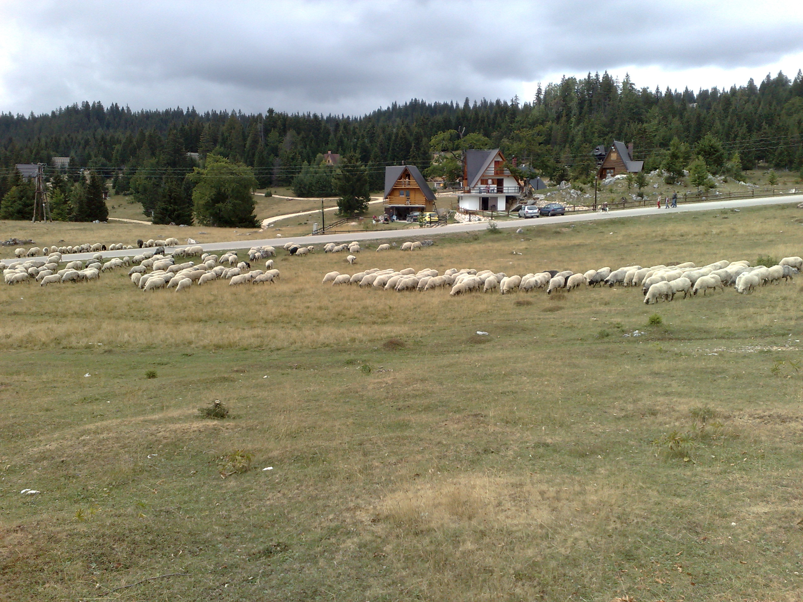 Sheep on mountain Vlašić